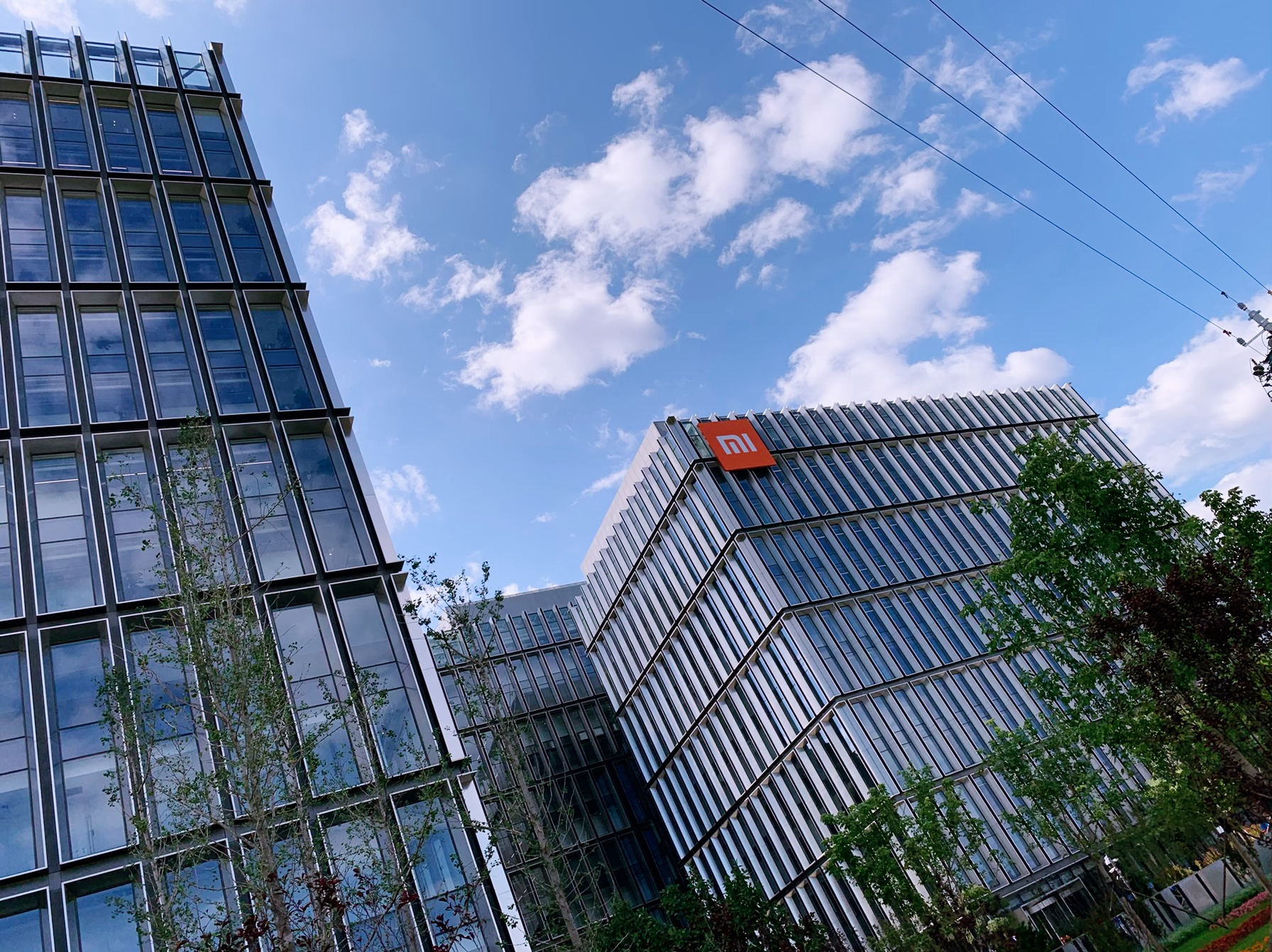 小米科技园，2019年8月